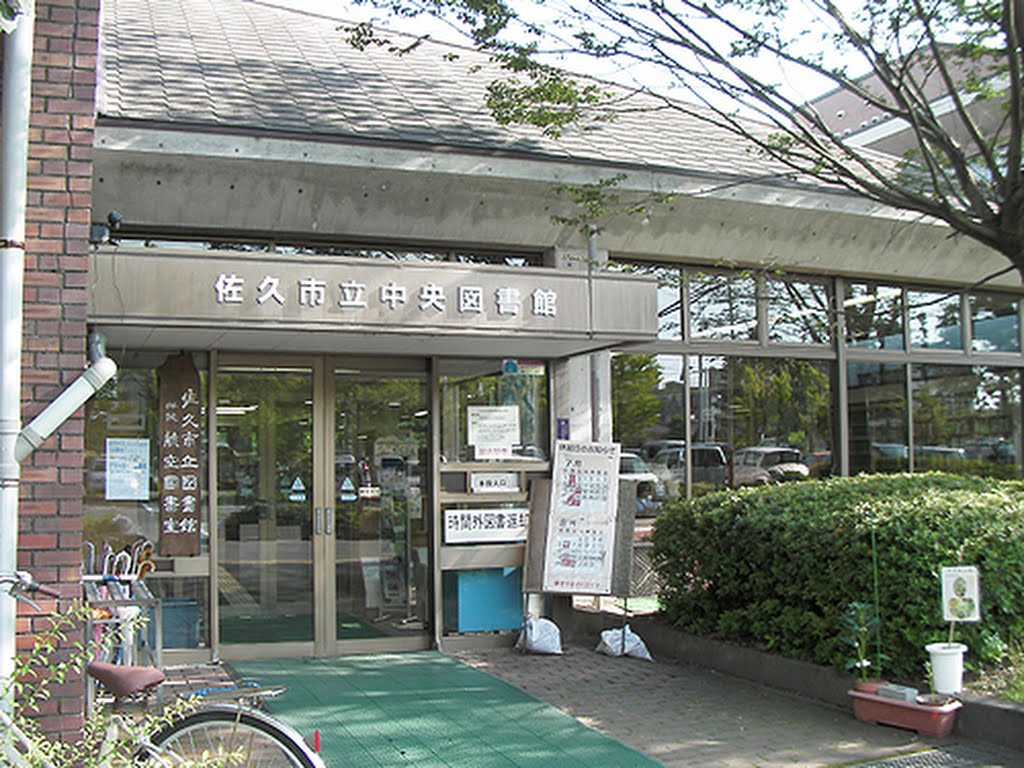 長野県の佐久市立中央図書館。